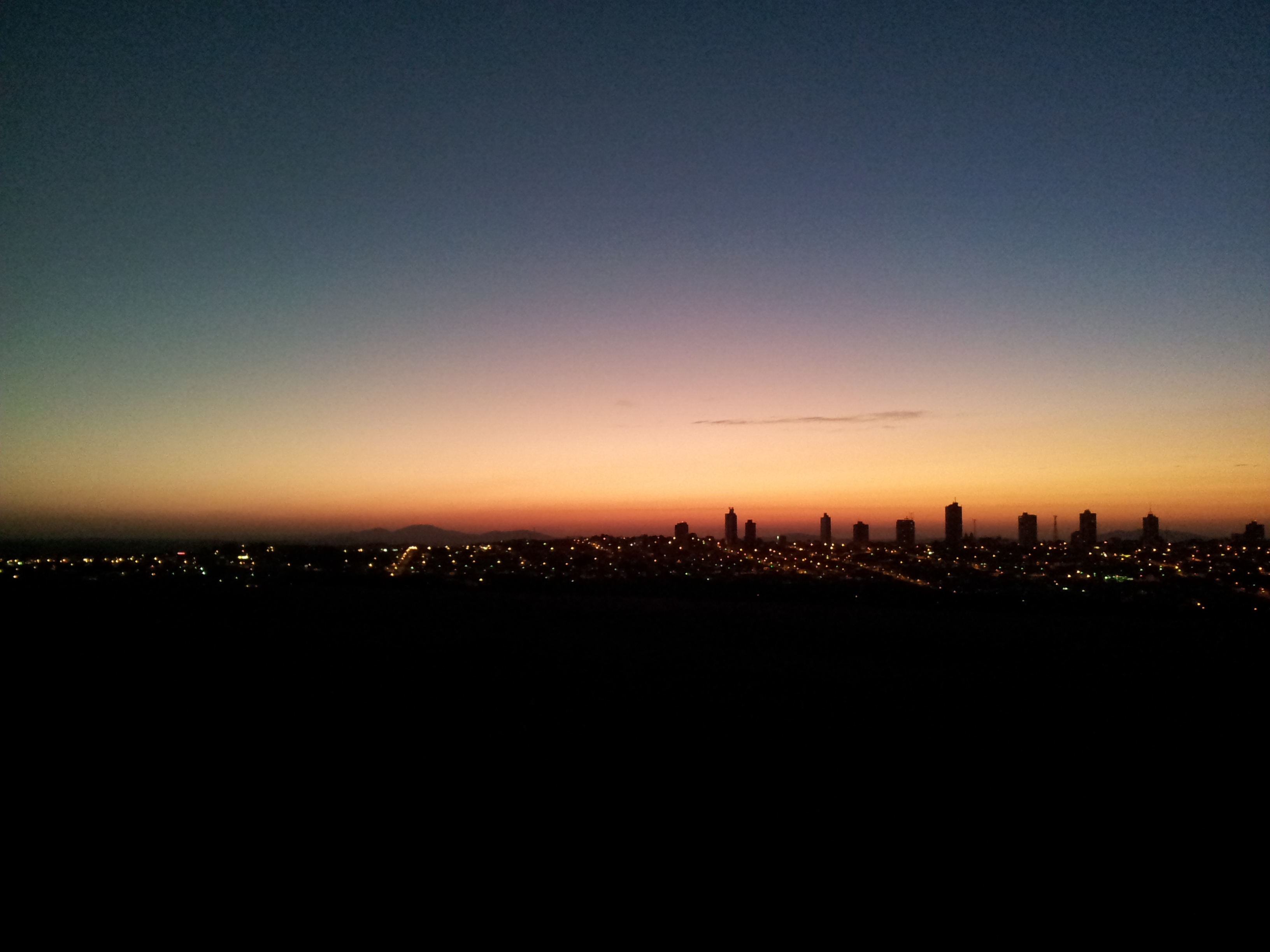 Alfenas vista a partir do aeroporto.